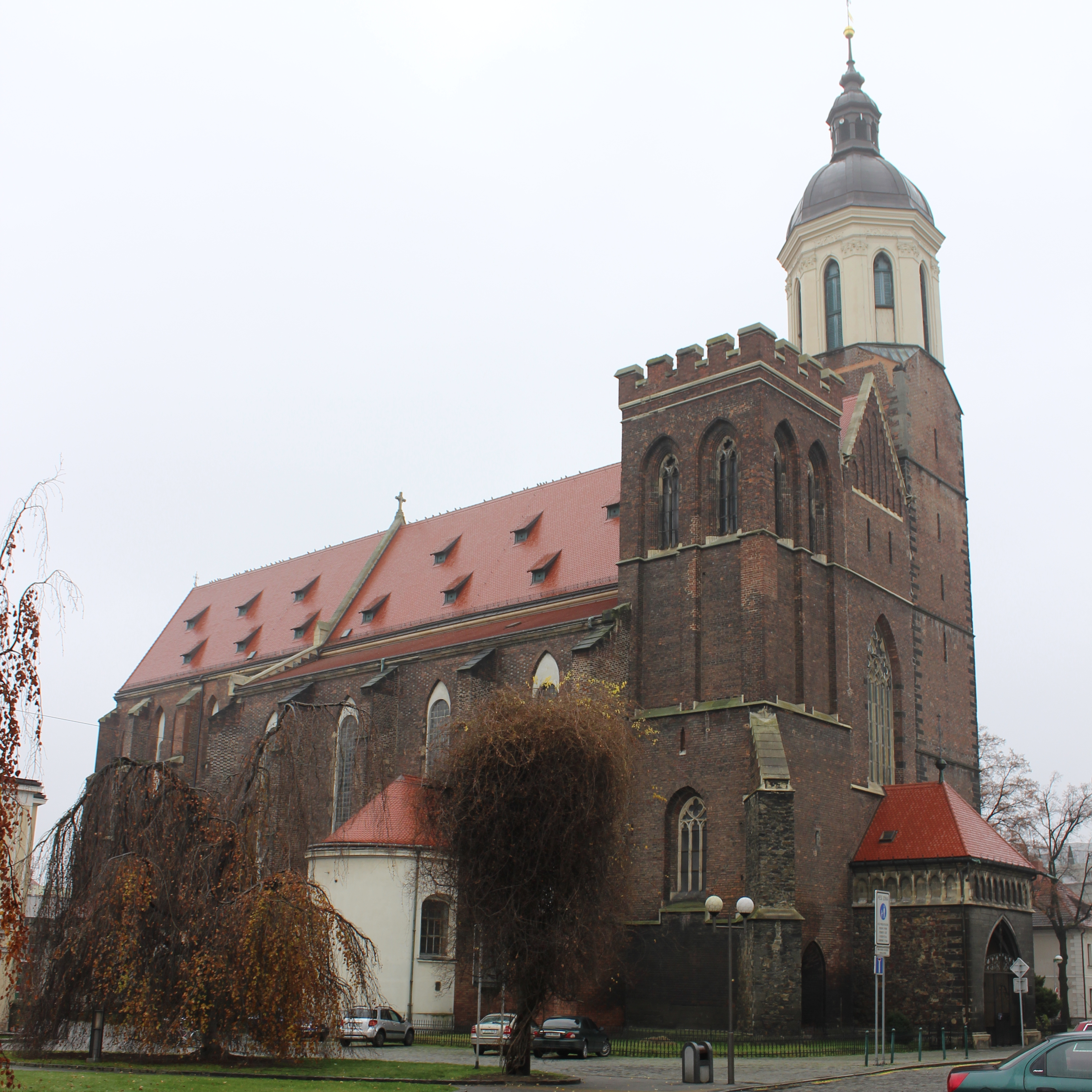 Věž opavské konkatedrály.